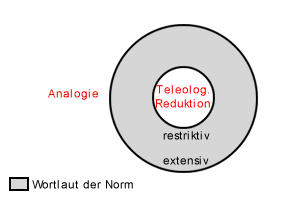 Einfache und ergänzende Auslegung von Normen: Wird die äußerste noch mögliche Wortlautgrenze überschritten, liegt Analogie vor, wird der engstmögliche Wortlaut unterschritten, teleologische Reduktion.